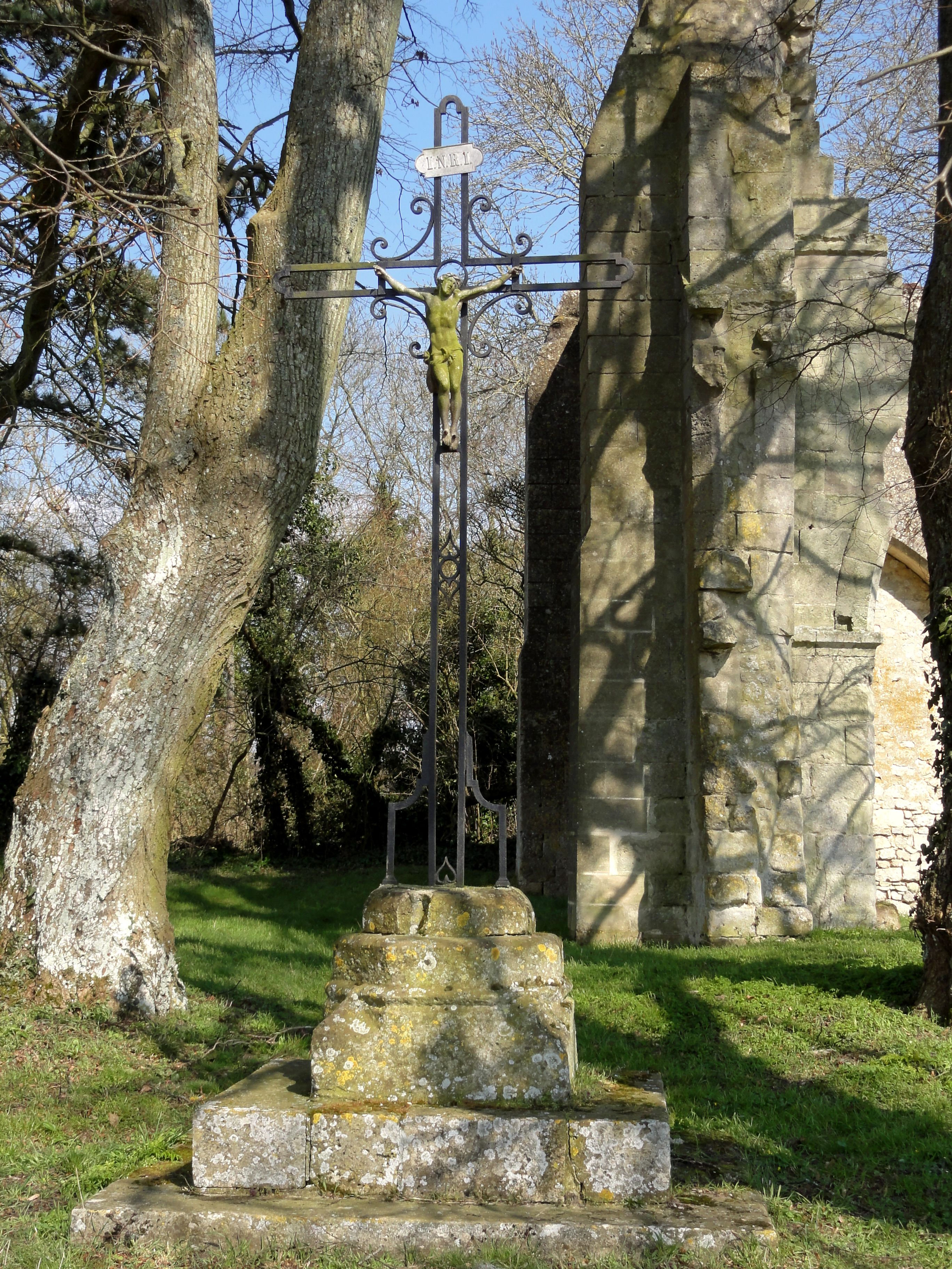 Calvaire près de la ruine de la chapelle romane de Champlieu.